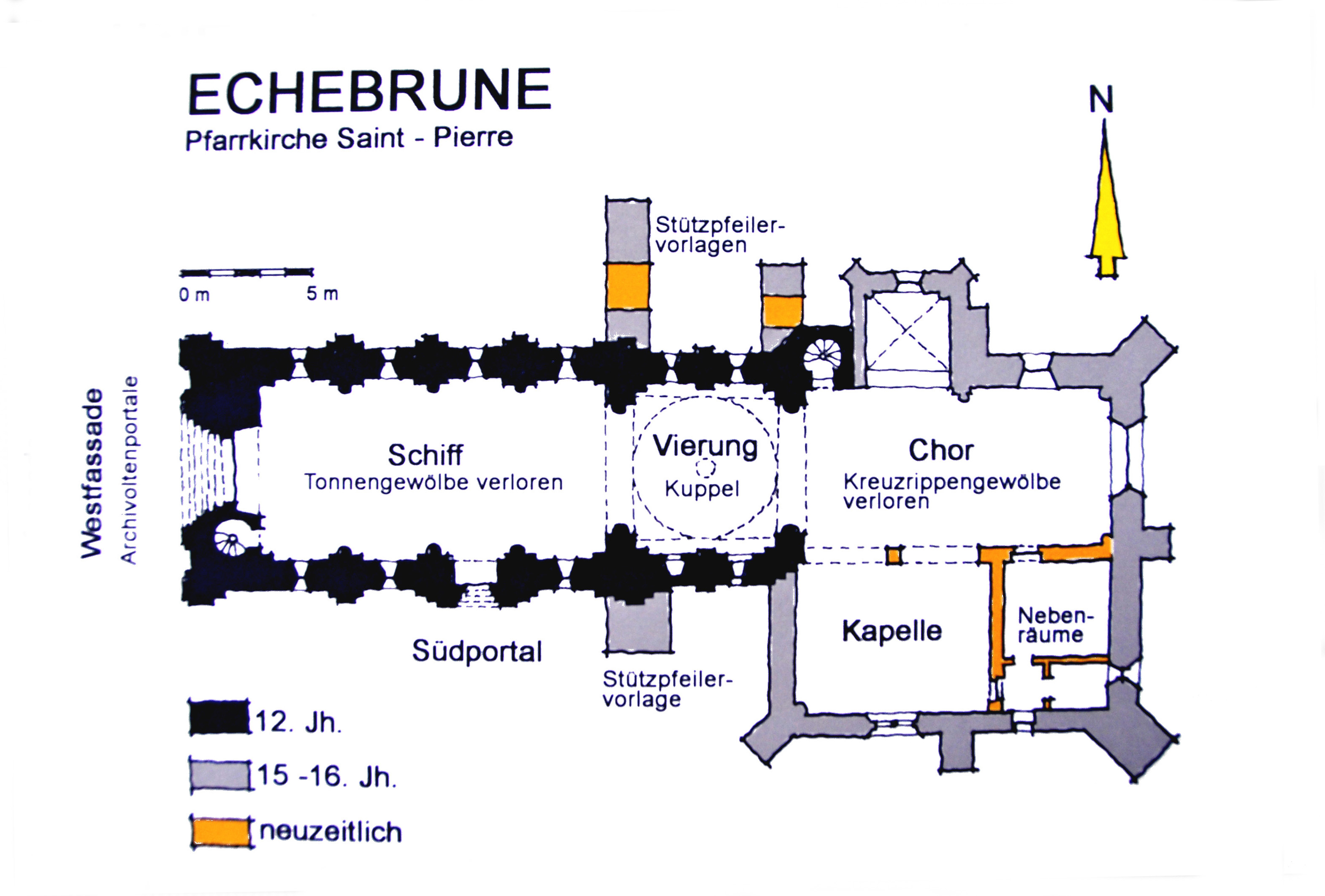 Echebrune, St.-Pierre, Grundriss